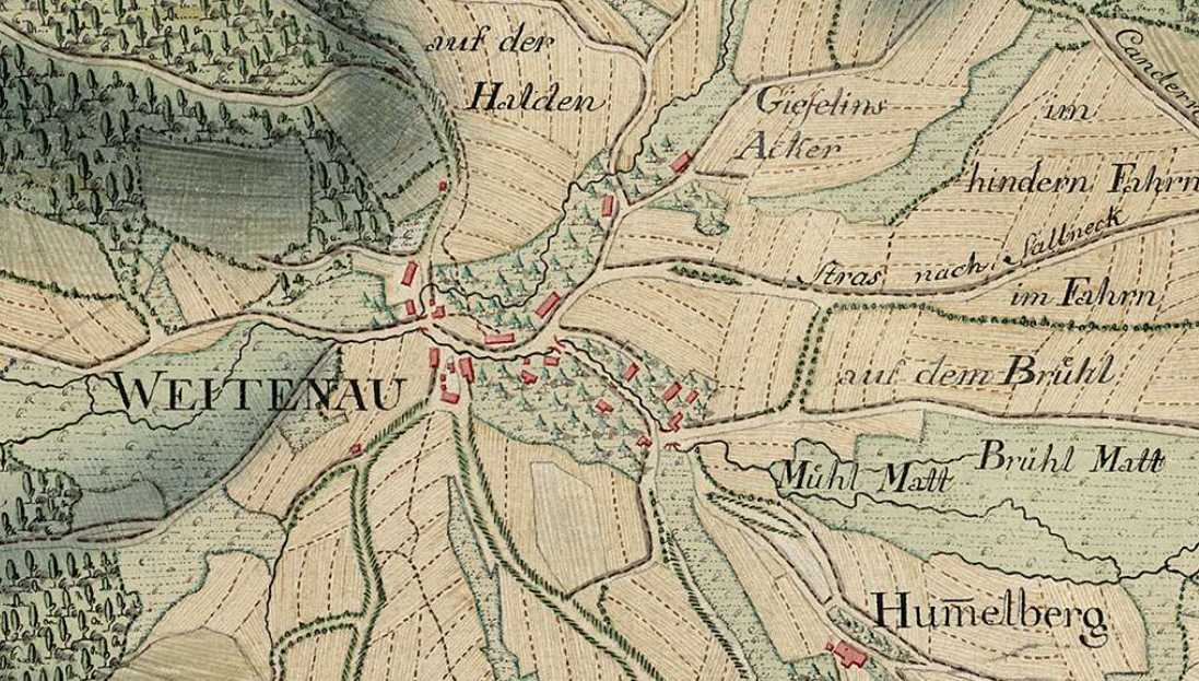 Karte Weitenau und Schillighof (Aussschnitt)